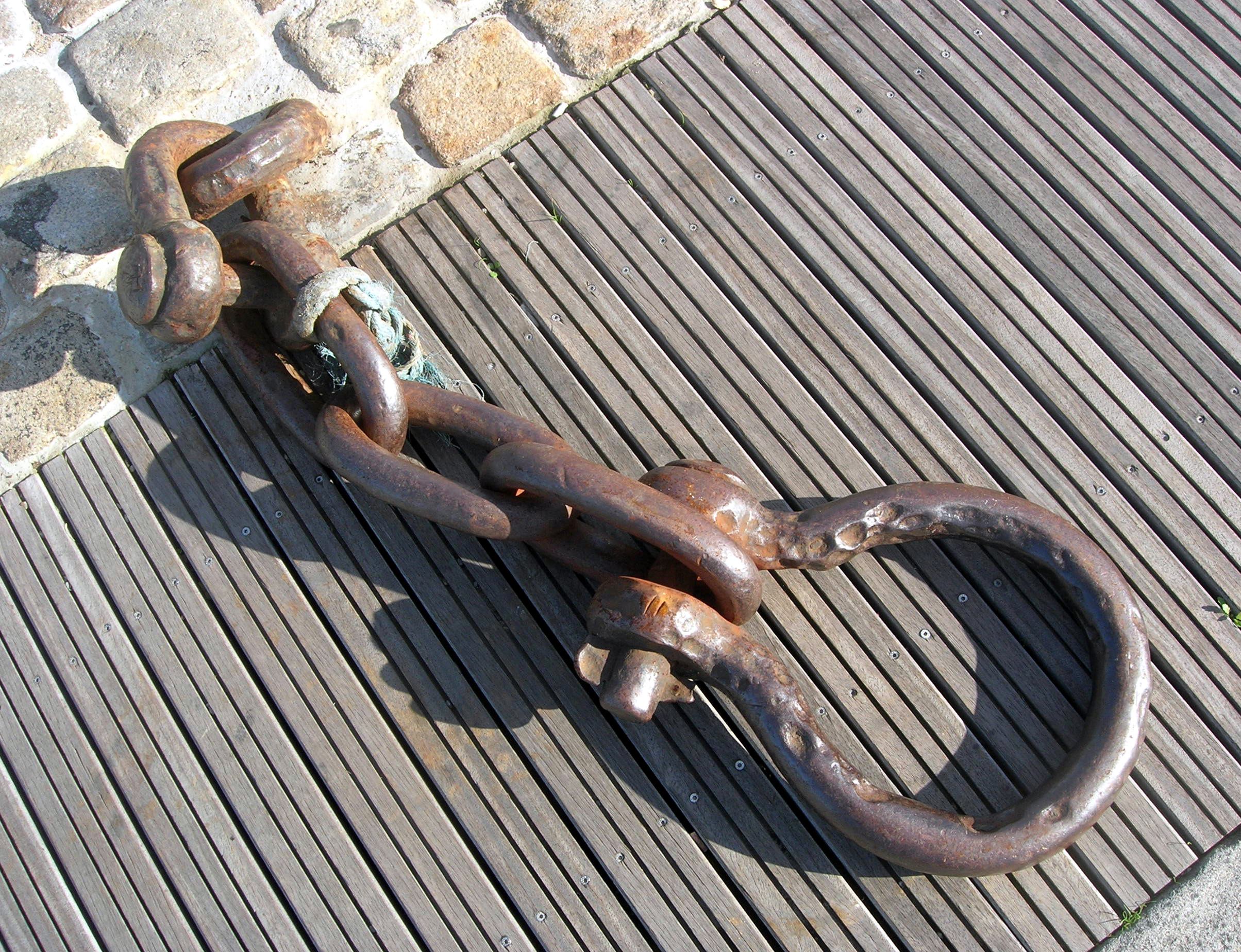 Description =Sur le quai du bassin des Grands Yachts du Port de La Rochelle. Source =Photo taken by Remi Jouan Date =Octobre 2006 Author =Remi Jouan